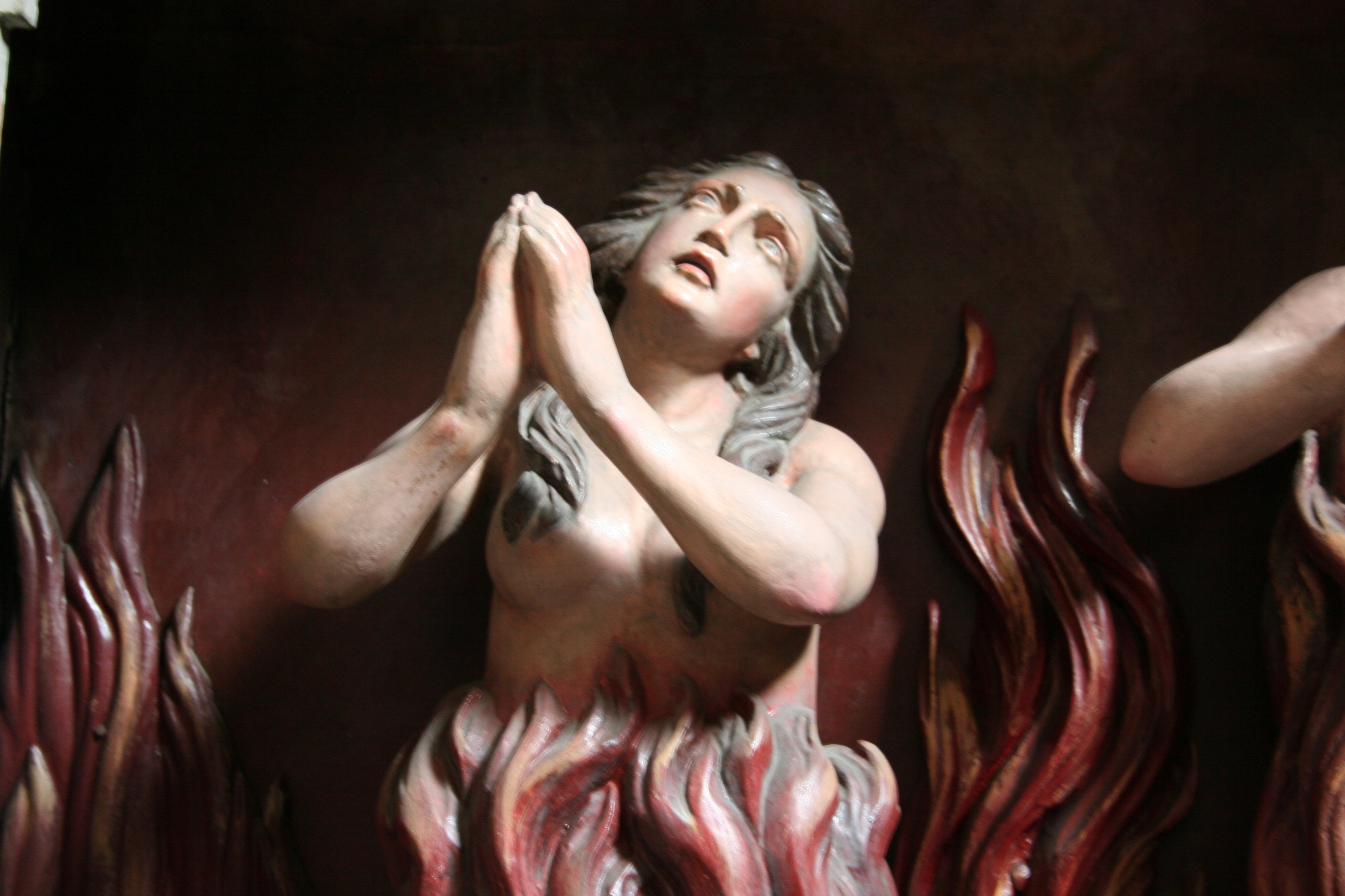 St_Egid_Klagenfurt,_Fegefeuer